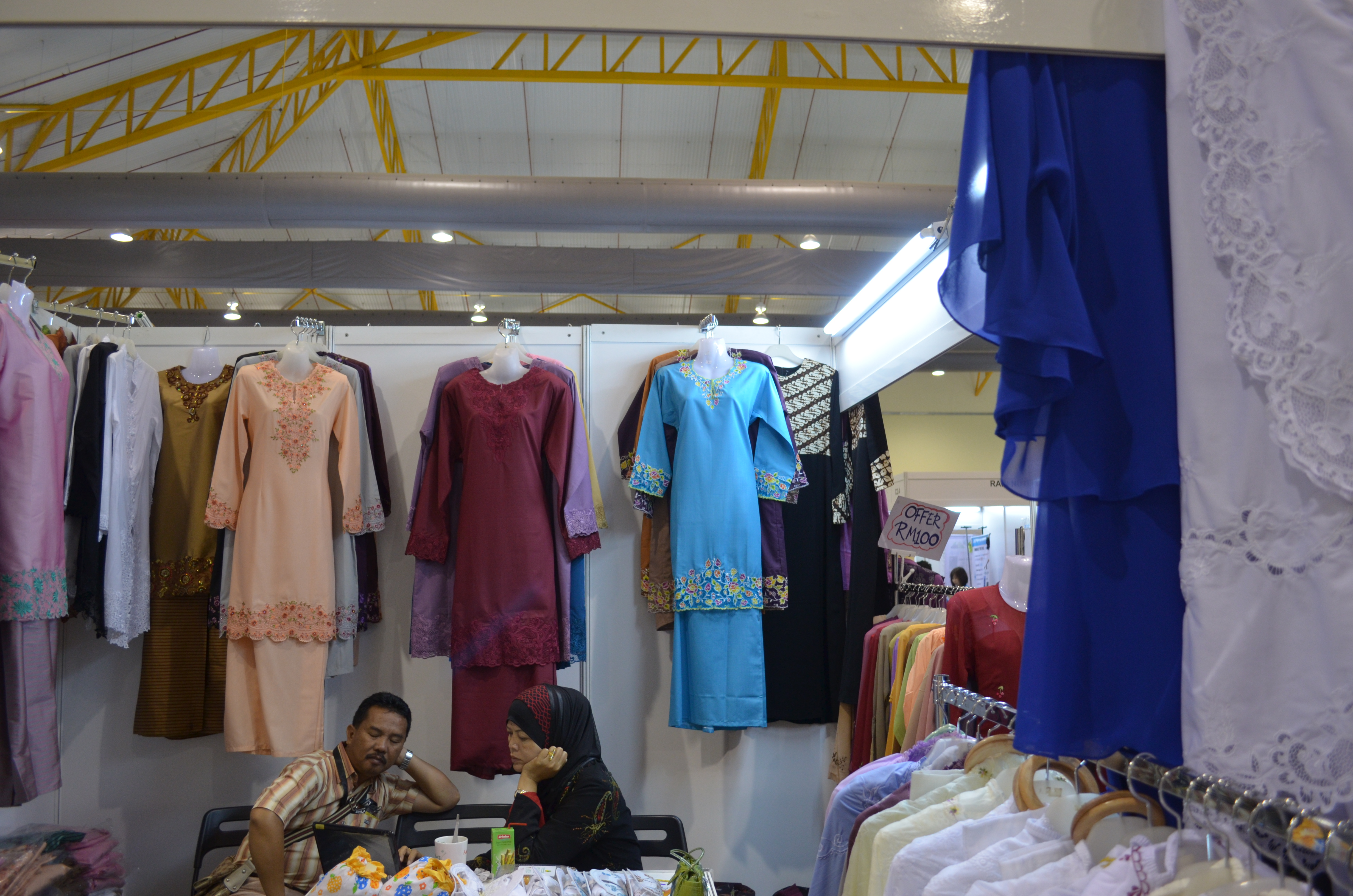 Pelbagai rekaan baju kurung tergantung di dinding.